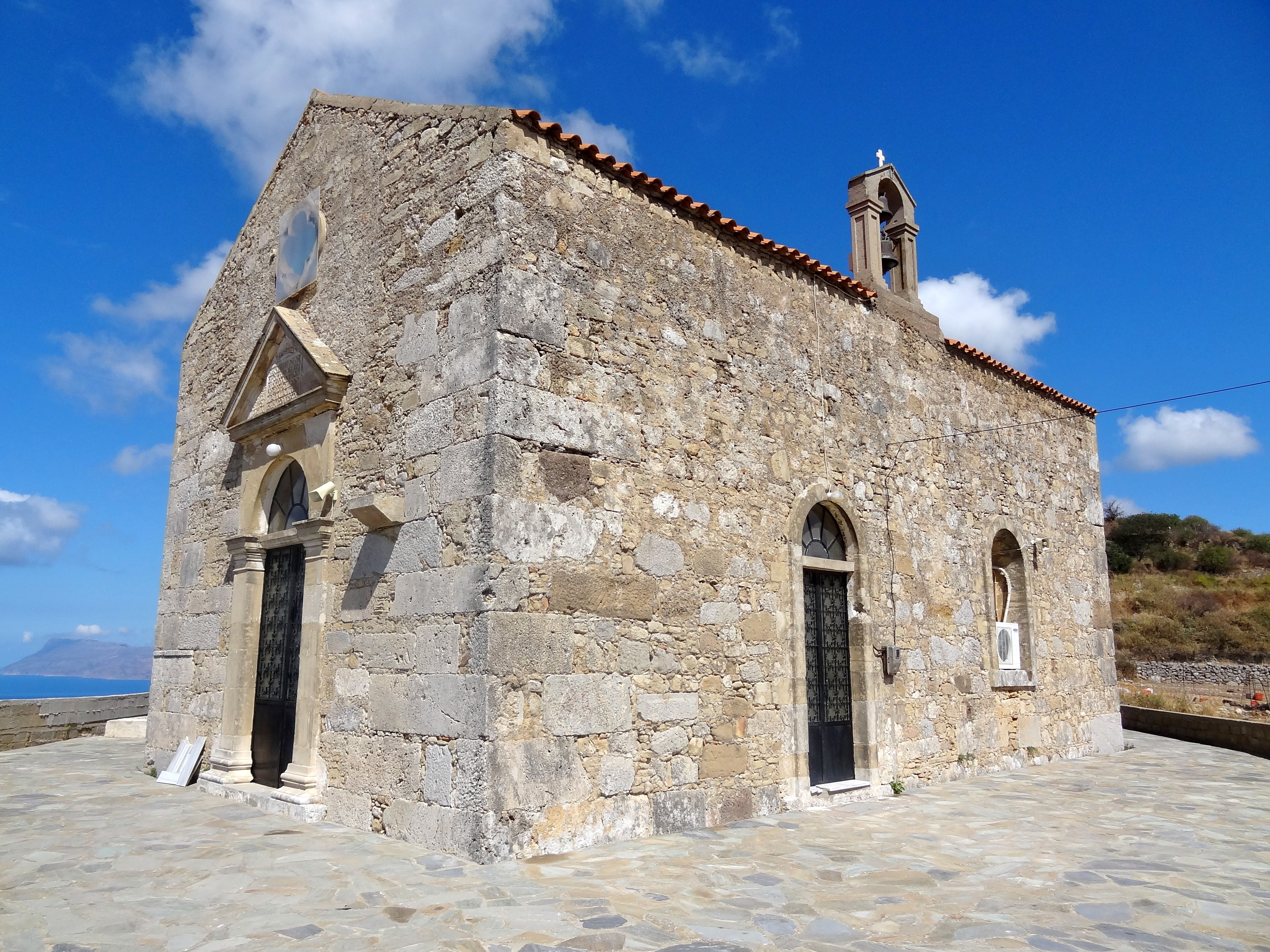 Kirche der 99 Heiligen Väter (Εκκλησία των 99 Αγίων Πατέρων), Gemeinde Kissamos, Regionalbezirk Chania, Kreta, Griechenland